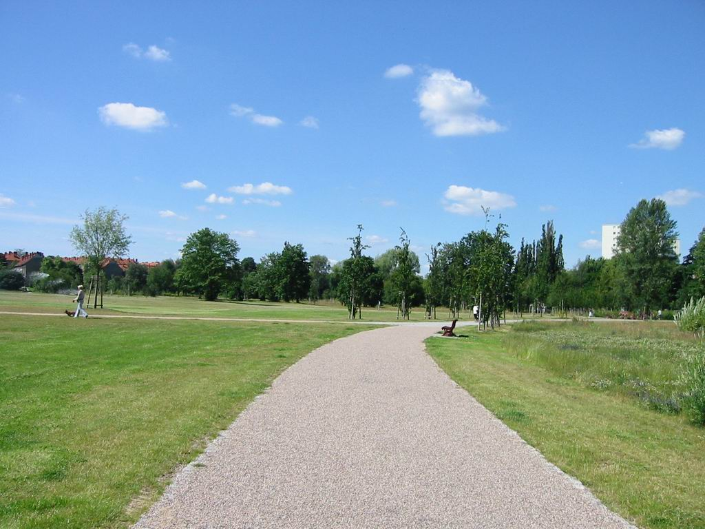 Spandau, Spekte-Grünzug, östlicher Teil